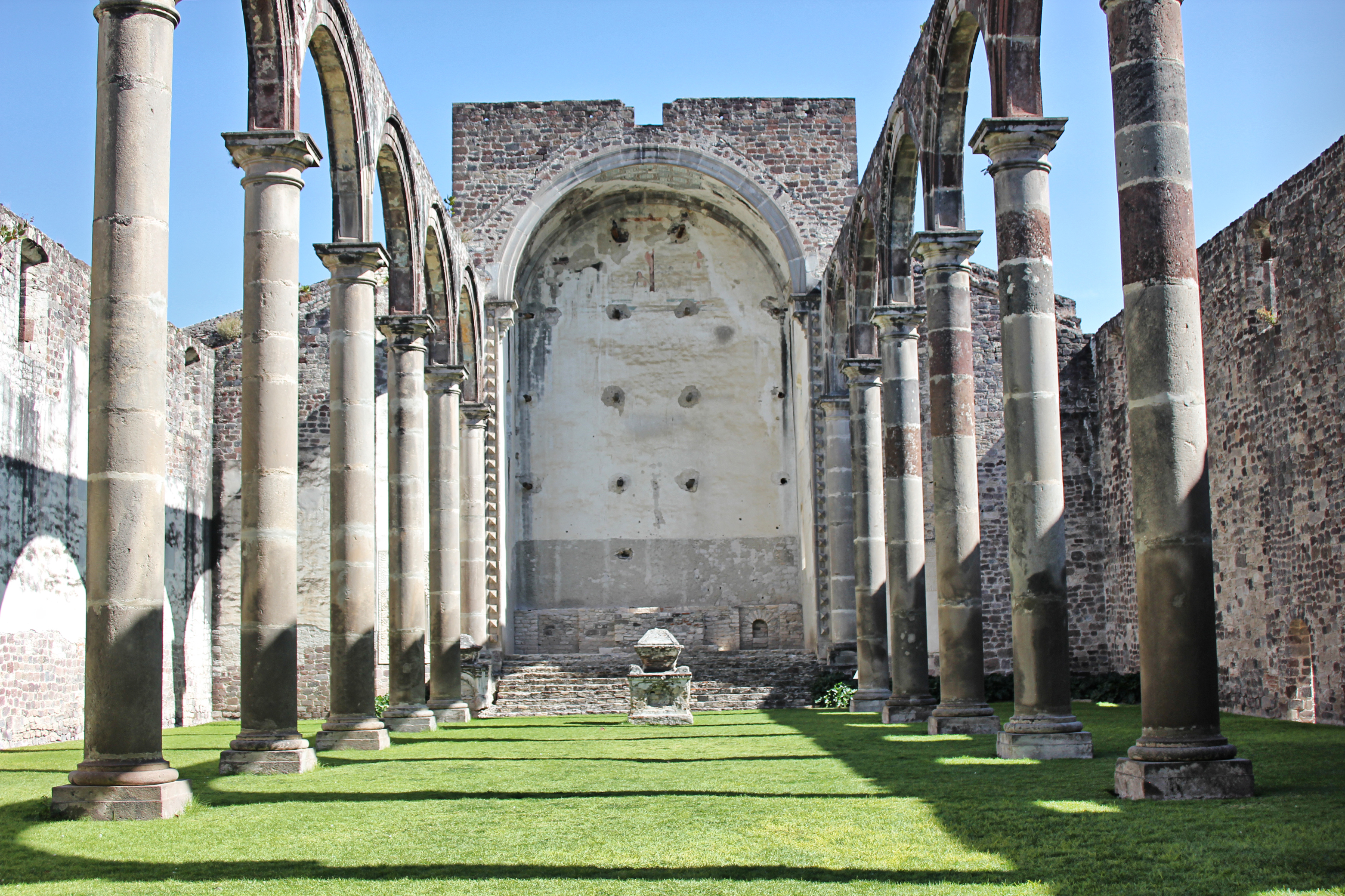 Interior del Ex-convento de San Francisco. Tecali de Herrera, Puebla.